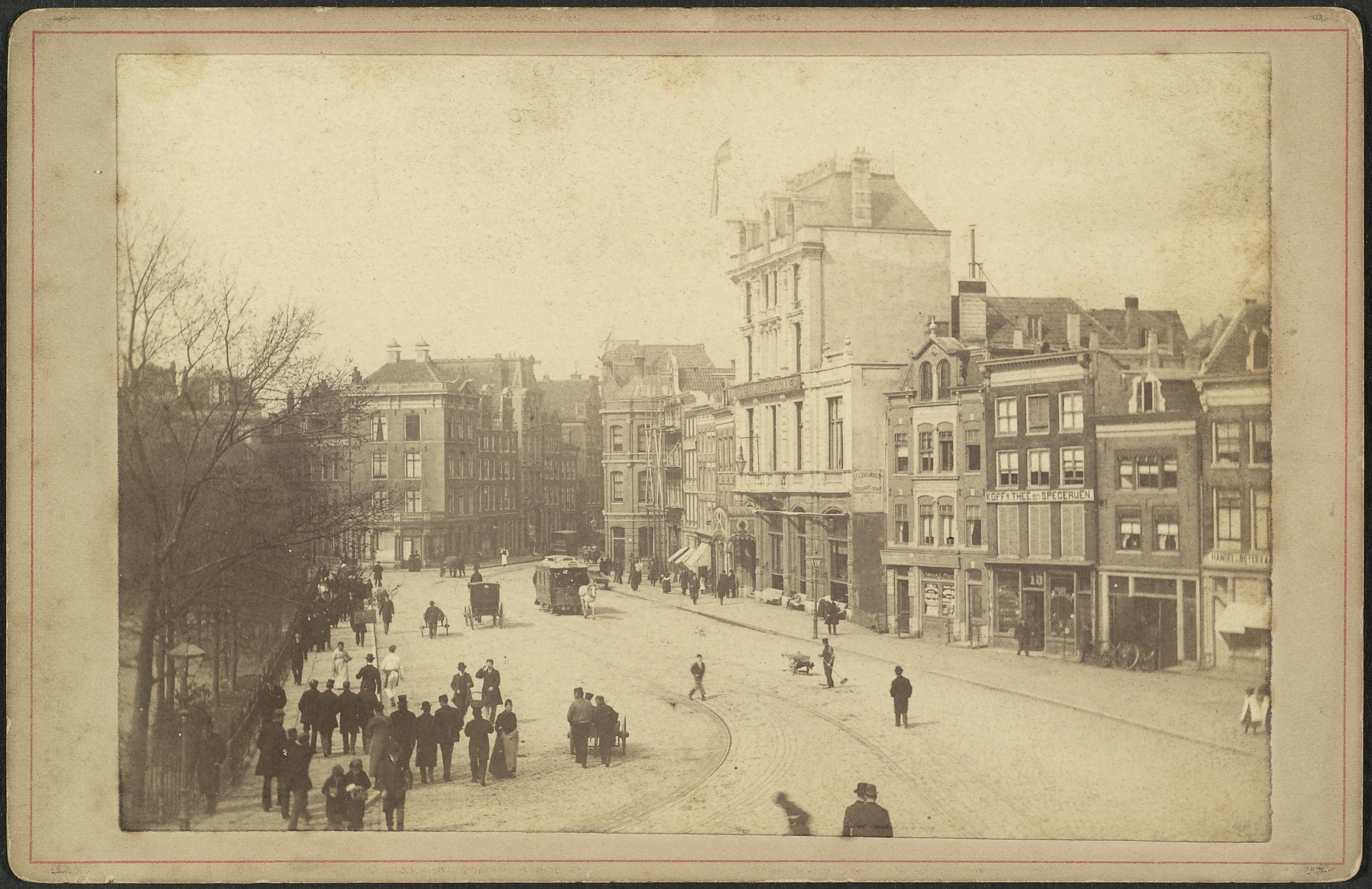 Plein/ Paardentram: Overzicht plein (opmerking: Kabinetfoto)